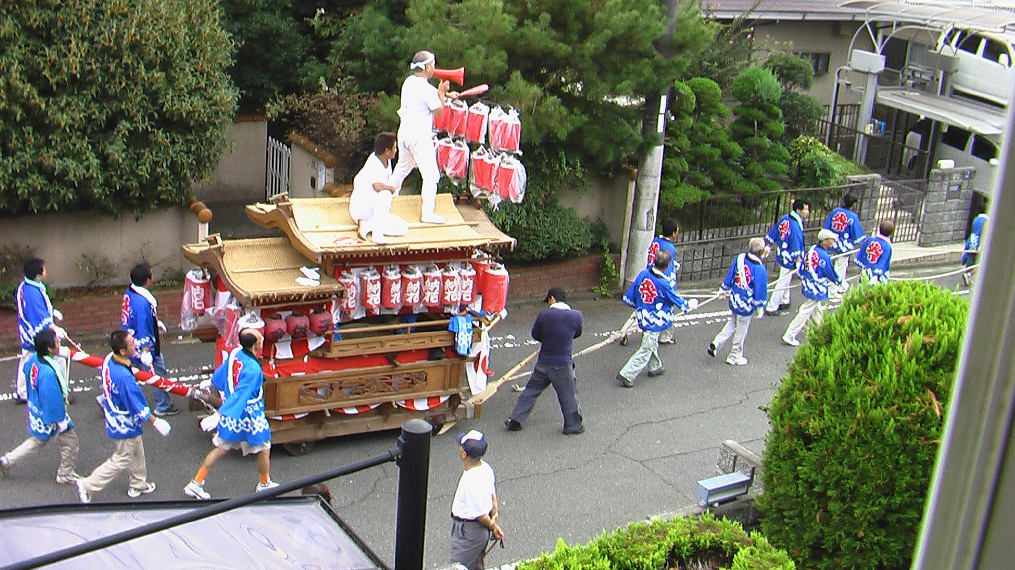 投稿者自身が、大阪府和泉市内で開催されている『和泉だんじり祭』を撮影。 撮影機材：某メーカー製デジタルスチルカメラ